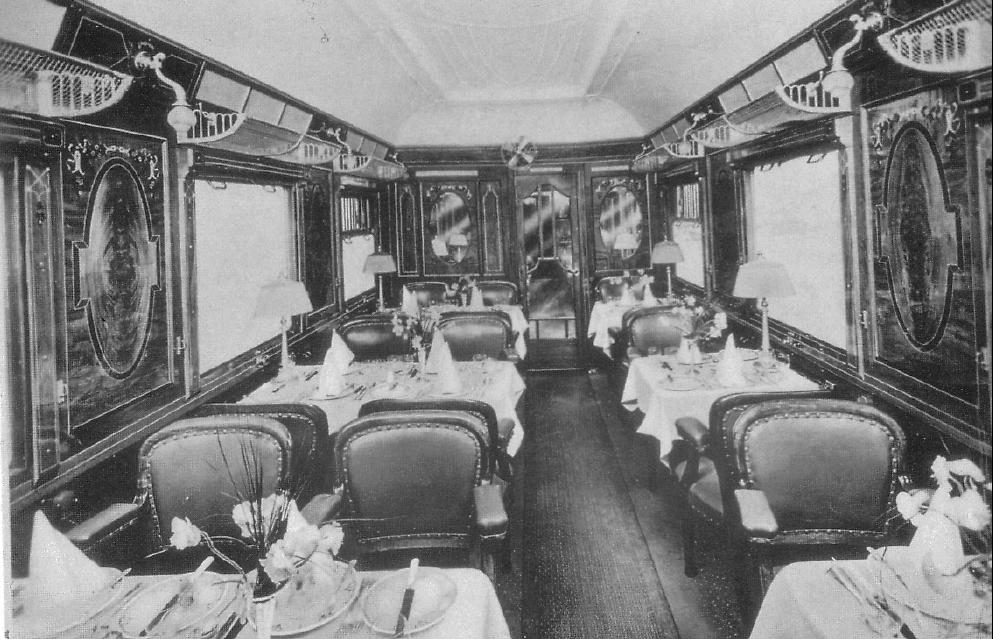 CIWl-Speisewagen von 1928